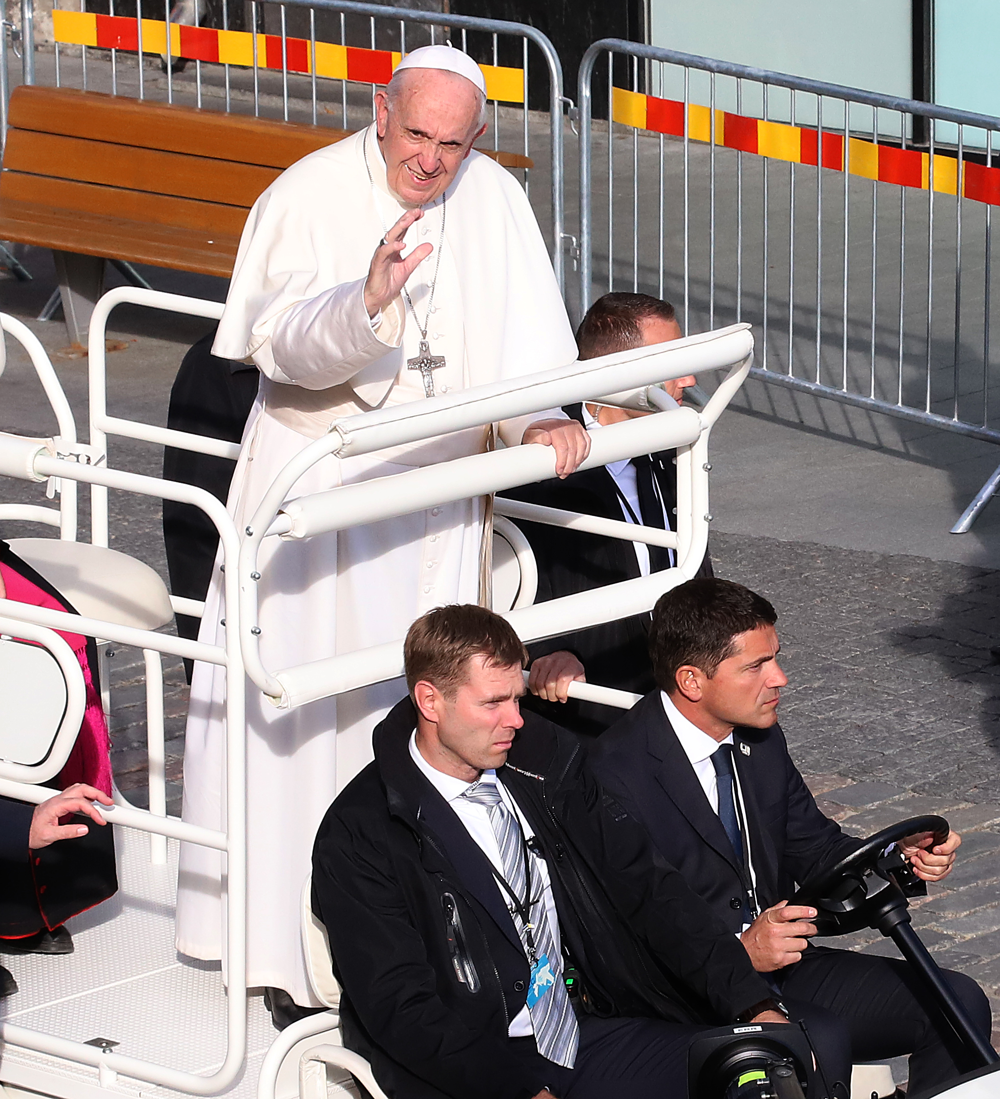 paavst Franciscus Tallinnas